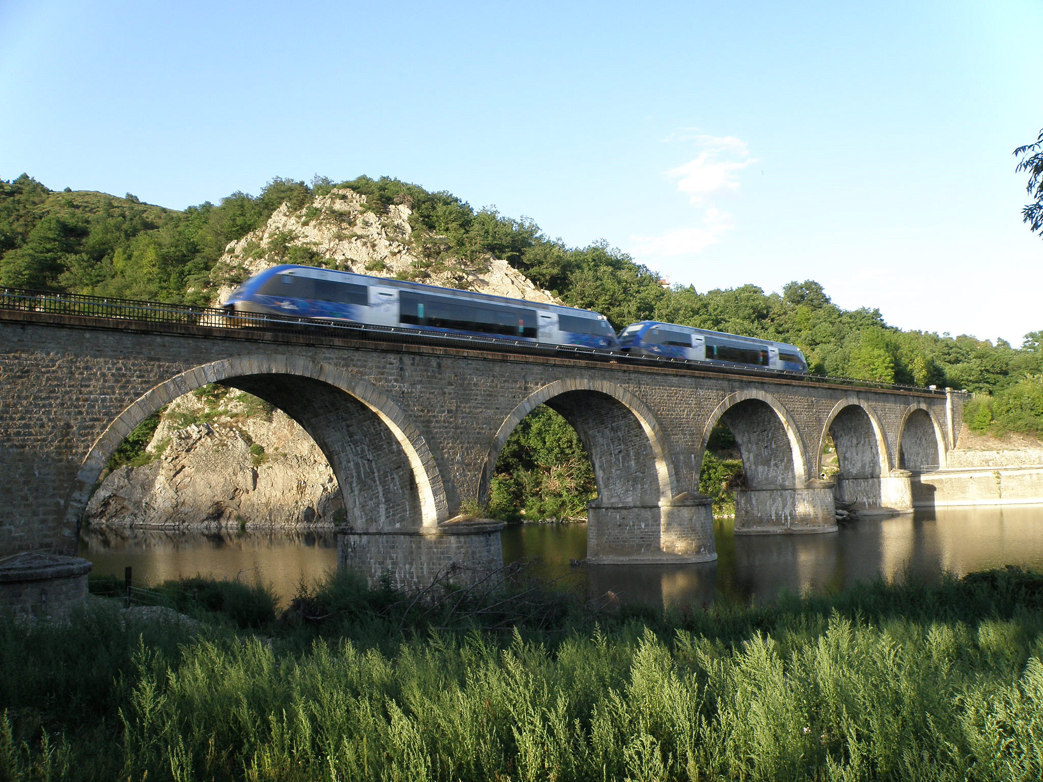 Beauzac, dép. de la Haute-Loire, France (Auvergne). Viaduc ferroviaire de Brenas, près du hameau de Brenas (dont on aperçoit la toiture d'une des maisons derrières les cimes des arbres au centre droit), dans le sud de la commune. Un train de type TER (Train Express Régional) faisant le service entre le Puy et Saint-Étienne franchit la Loire, qui fait ici frontière avec la commune voisine de Retournac. Les falaises à l'arrière-plan à gauche sont les Côtes du Suc.